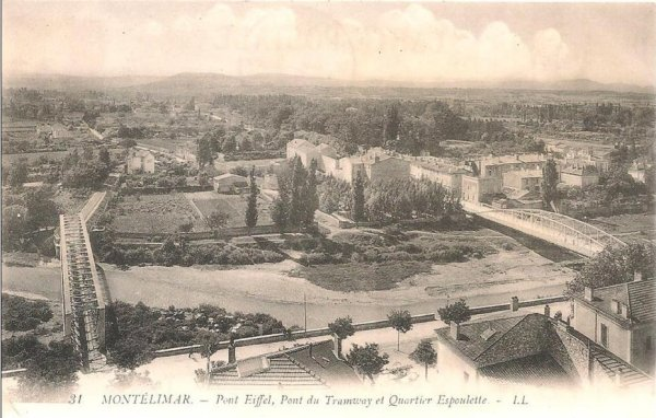 Montélimar - Pont Eiffel, Pont du Tramway et Quartier Espoulette (I.L.)